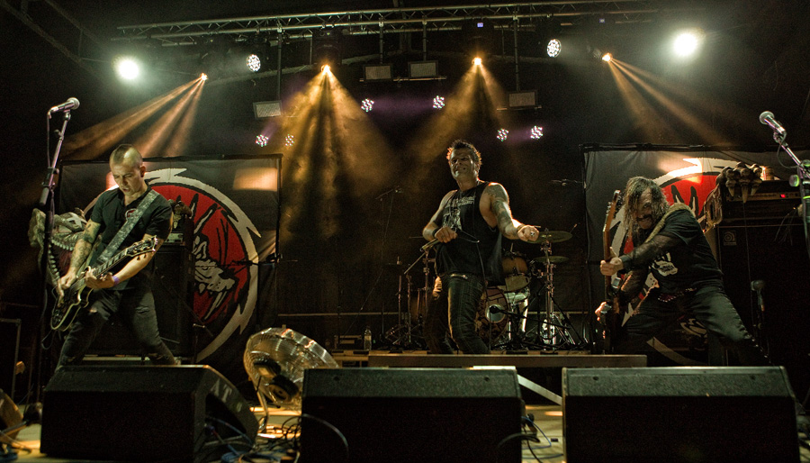 Fotografía al grupo de música Ratzinger durante uno de sus conciertos